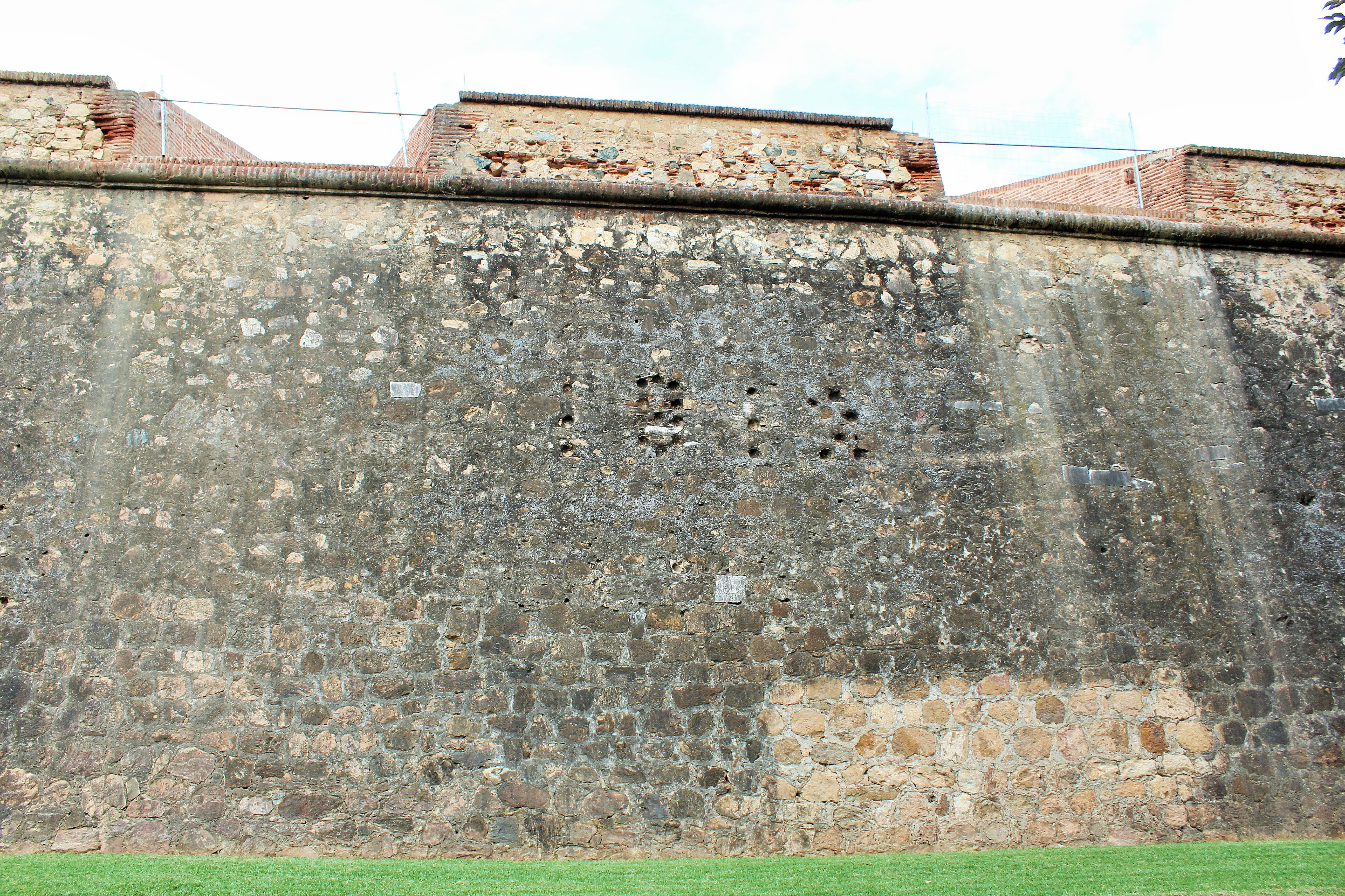 Lienzo con troneras y fecha 1812 grabada.